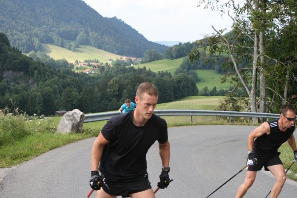 See Title